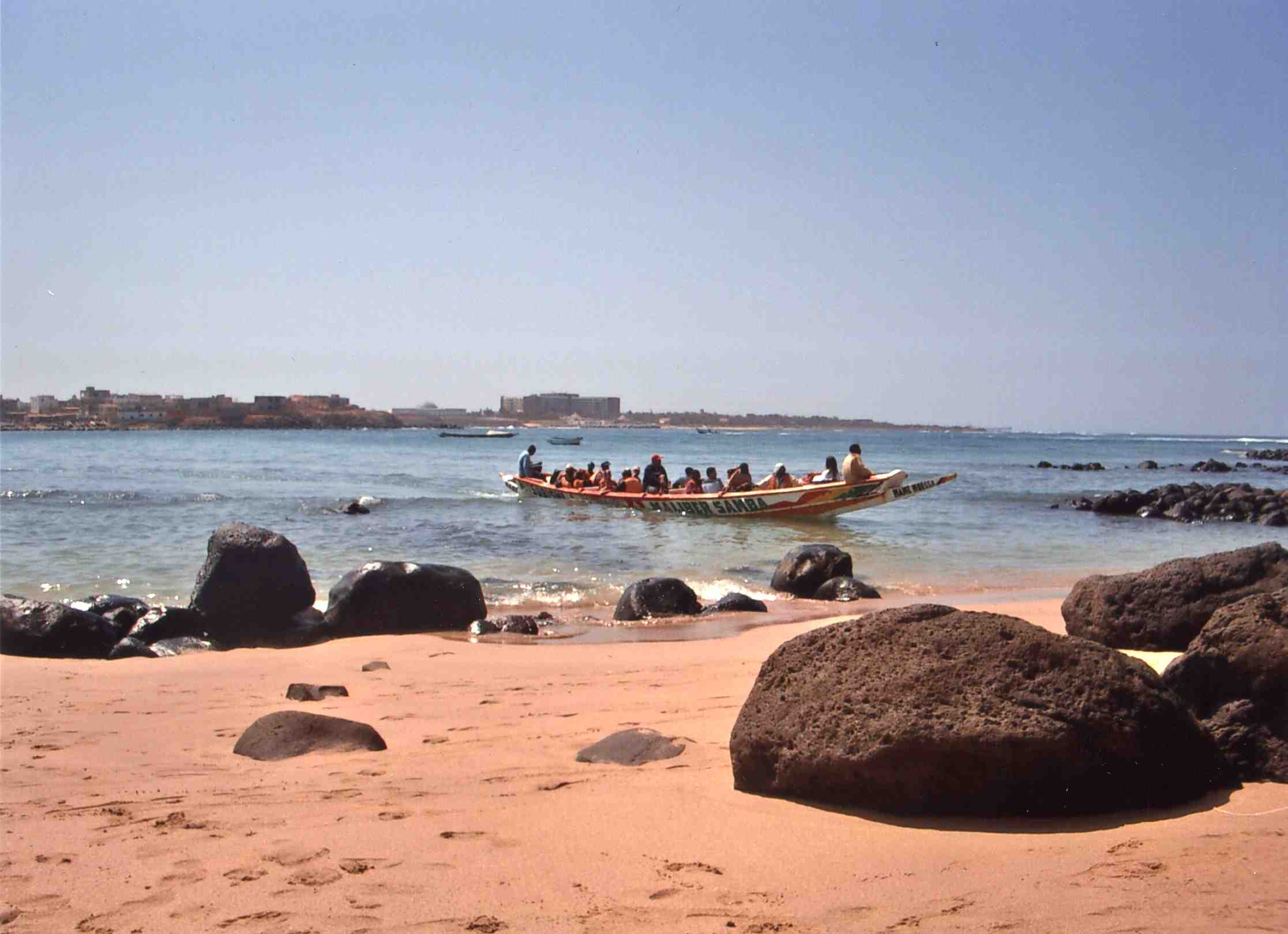 Ngor Island (Senegal)